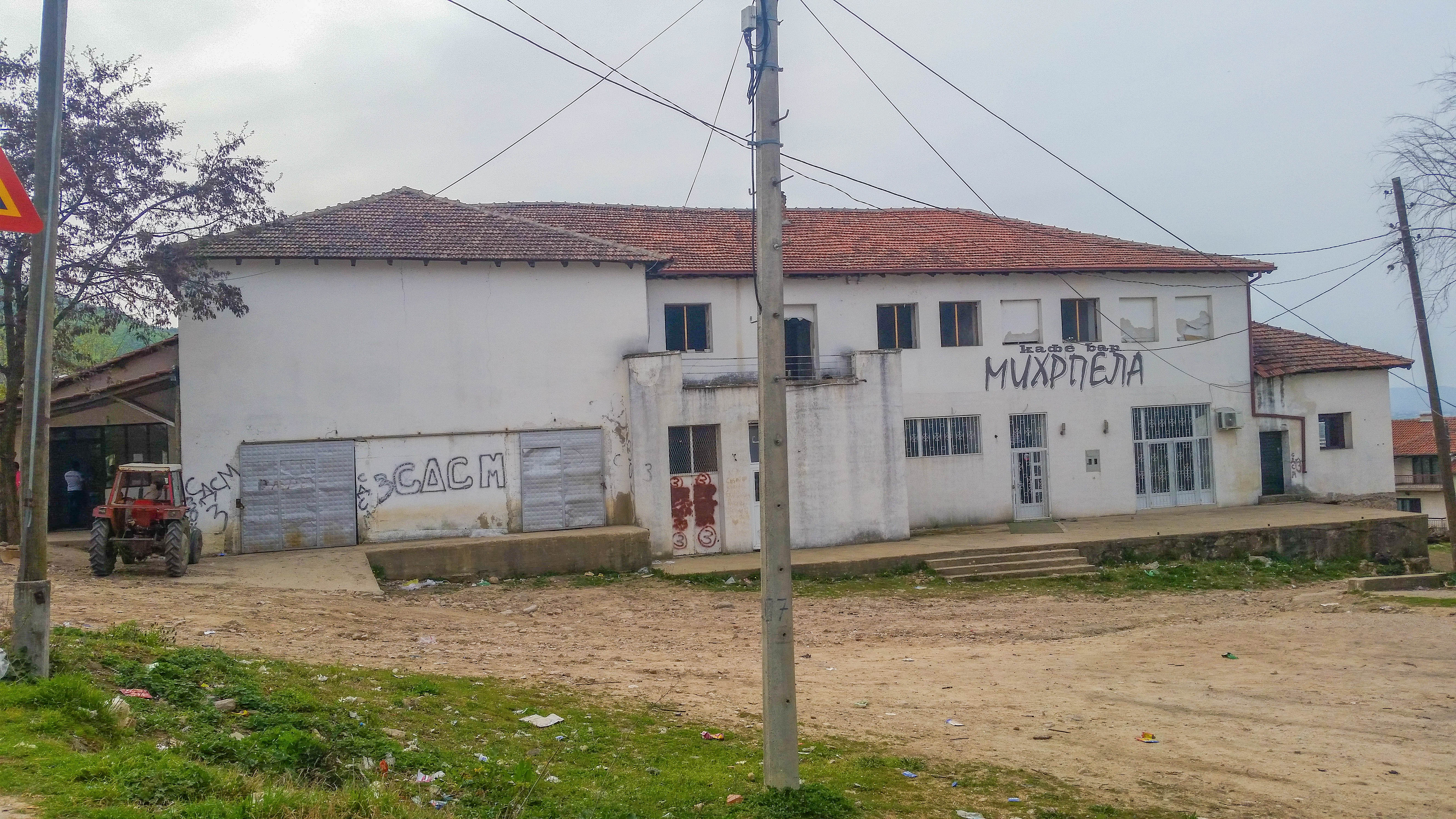 Културен дом во селото